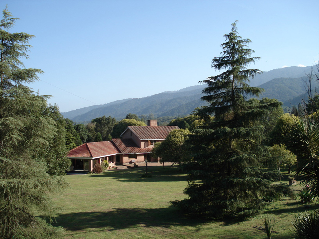 El Refugio, El Corte, Yerba Buena, Tucumán.